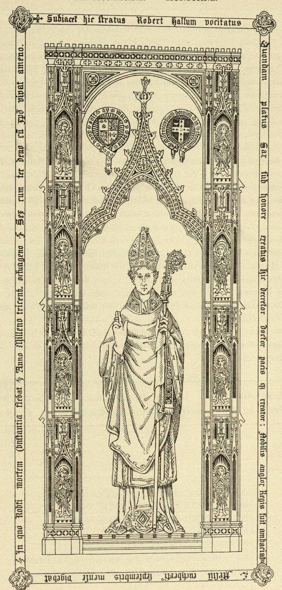 Konstanz, Münster, Grabplatte Bischof Robert Hallum im Chor Abbildung aus: Franz Xaver Kraus: Die Kunstdenkmäler des Grossherzogthums Baden. Band 1: Die Kunstdenkmäler des Kreises Konstanz. Freiburg i. Br. 1887